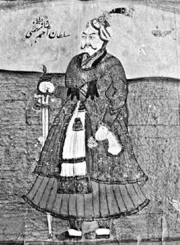 Paiting of Ahmed Shah Al Wali Bahamani.